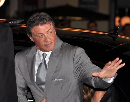 Sylvester Stallone in Paris at the french premiere of The Expendables 2